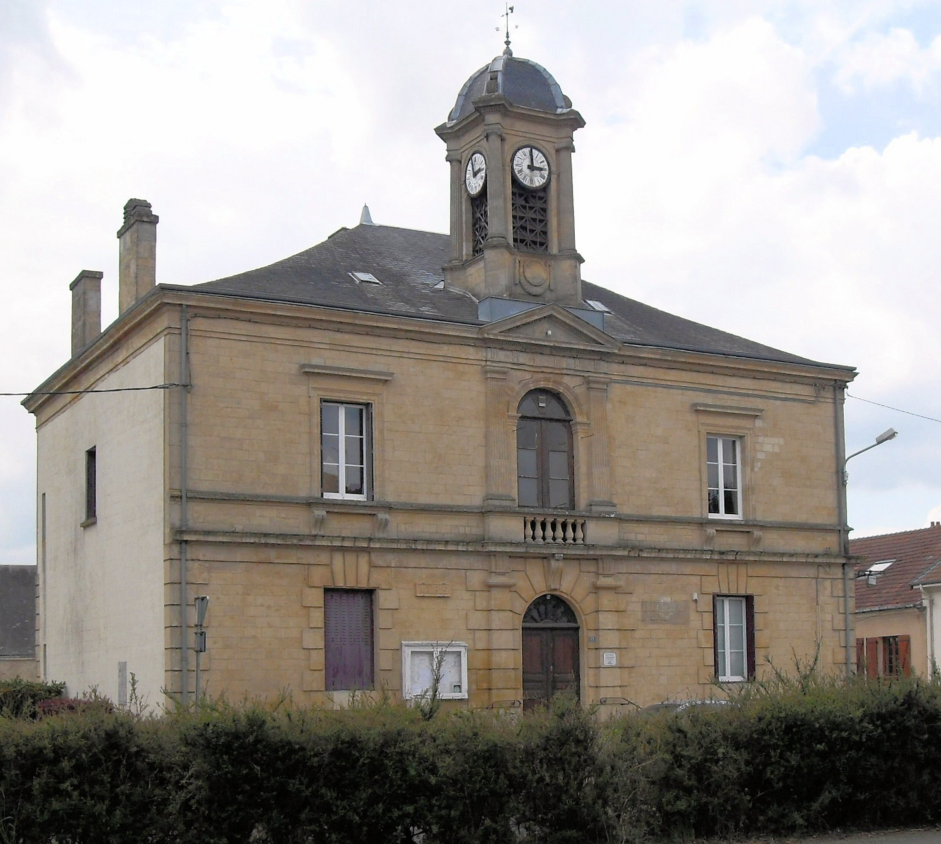 La mairie d'Inor